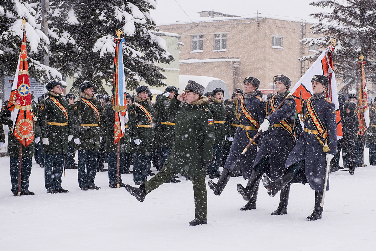 1-я гвардейская танковая Краснознамённая армия отметила 75-ю годовщину формирования.